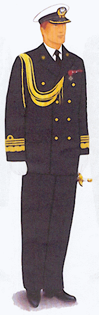 Rysunek ten pochodzi z załącznika do rozporządzenia ministra obrony narodowej z dnia 2 grudnia 2004 r. w sprawie wzorów oraz noszenia umundurowania i oznak wojskowych przez żołnierzy zawodowych i kandydatów na żołnierzy zawodowych. Kkic 15:19, 12 kwi 2005 (CEST)